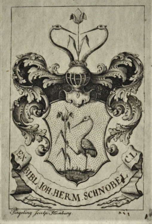 Gottfried Christian Pingeling: Exlibris für Johann Hermann Schnobel